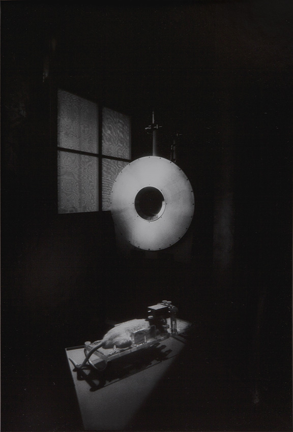 Werk von Hans Danuser aus dem Zyklus In Vivo